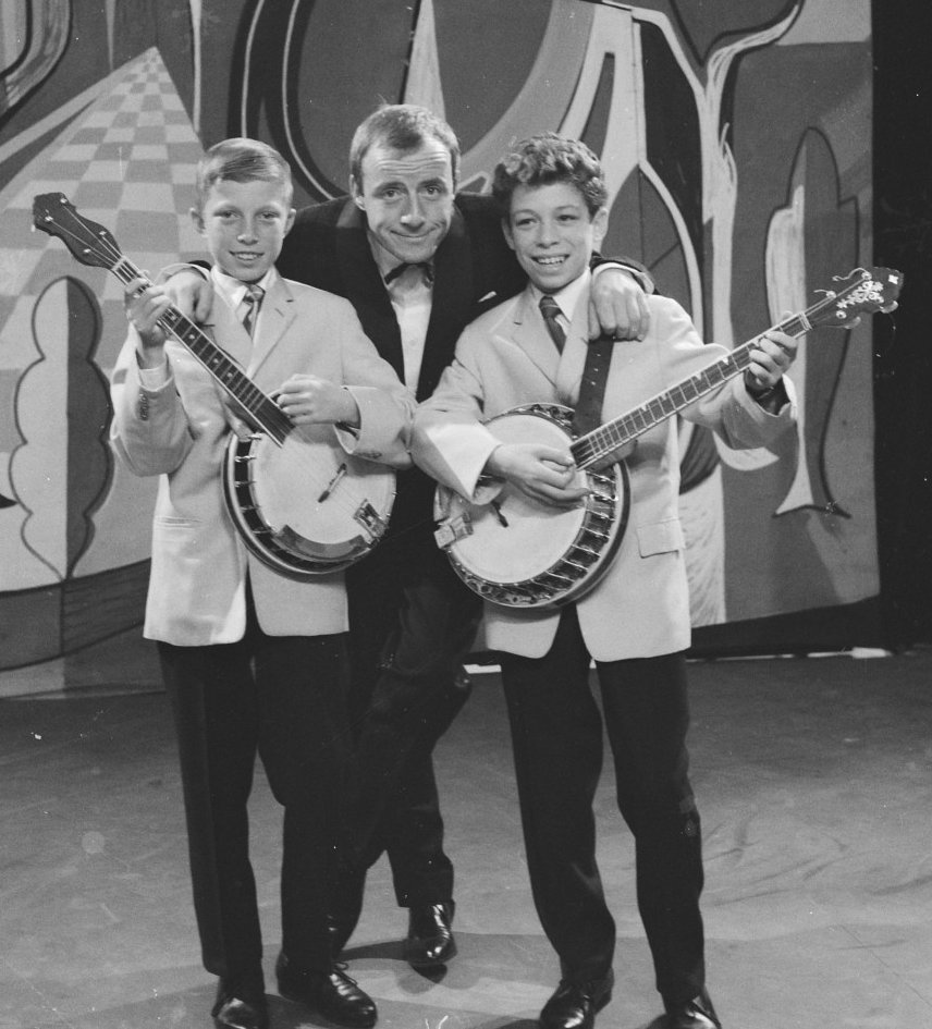 Jan & Kjeld with Johnny Kraaijkamp on the AVRO Weekend Show